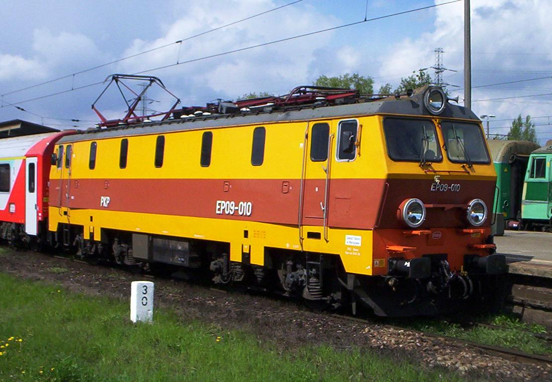 EP09-010 at Warszawa Zachodnia station.